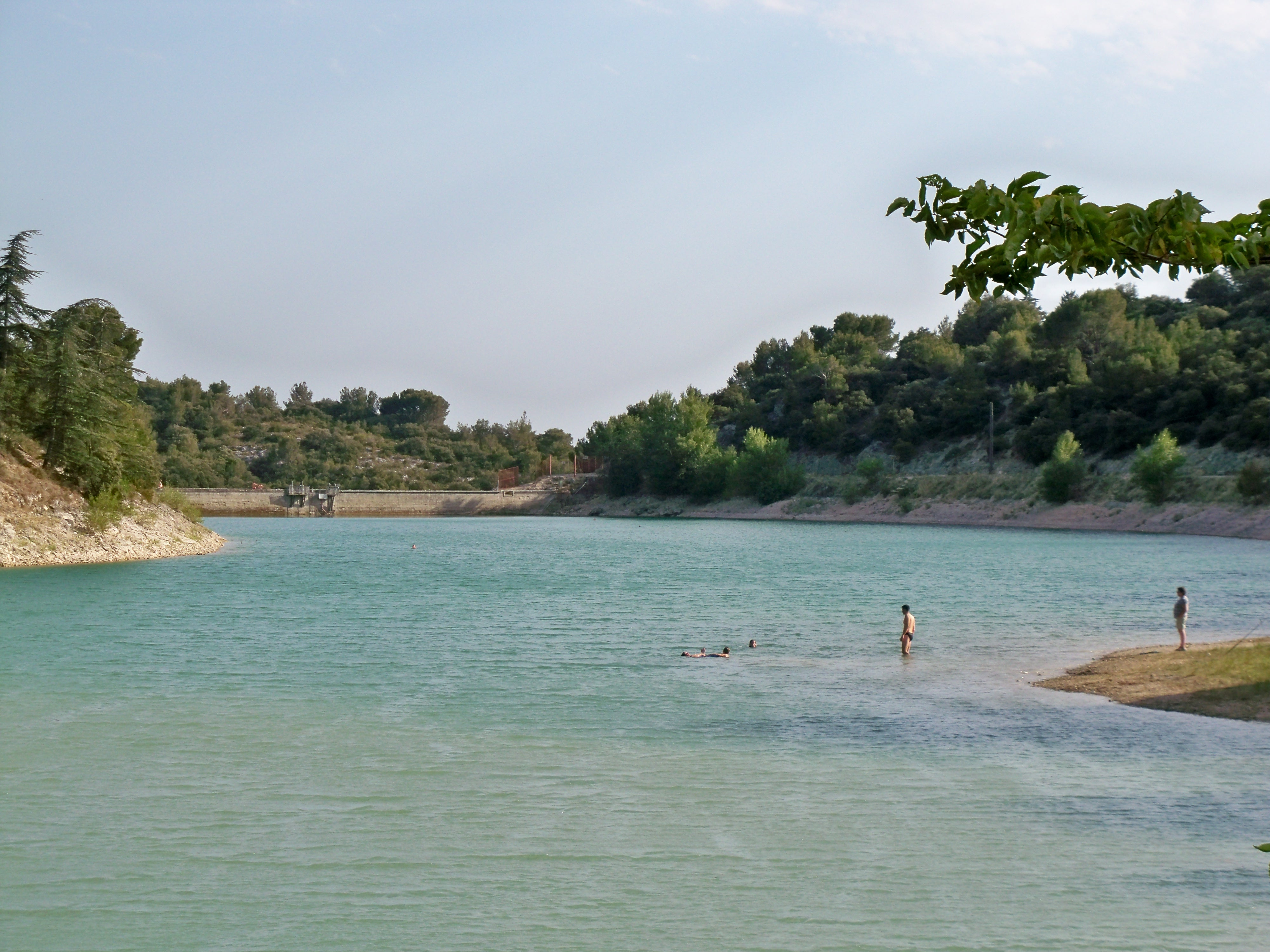 Lac du Paty, Caromb, Vaucluse, France